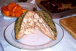 Múcua (Baobab fruit)